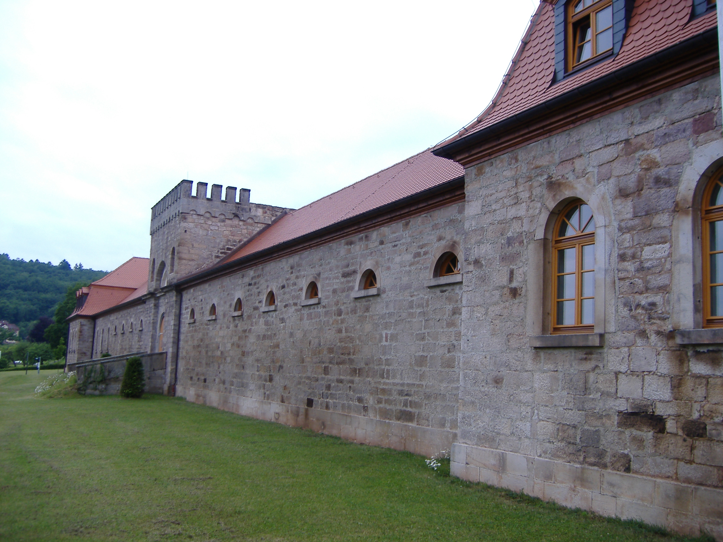 Remise Staatsbad Bad Brückenau